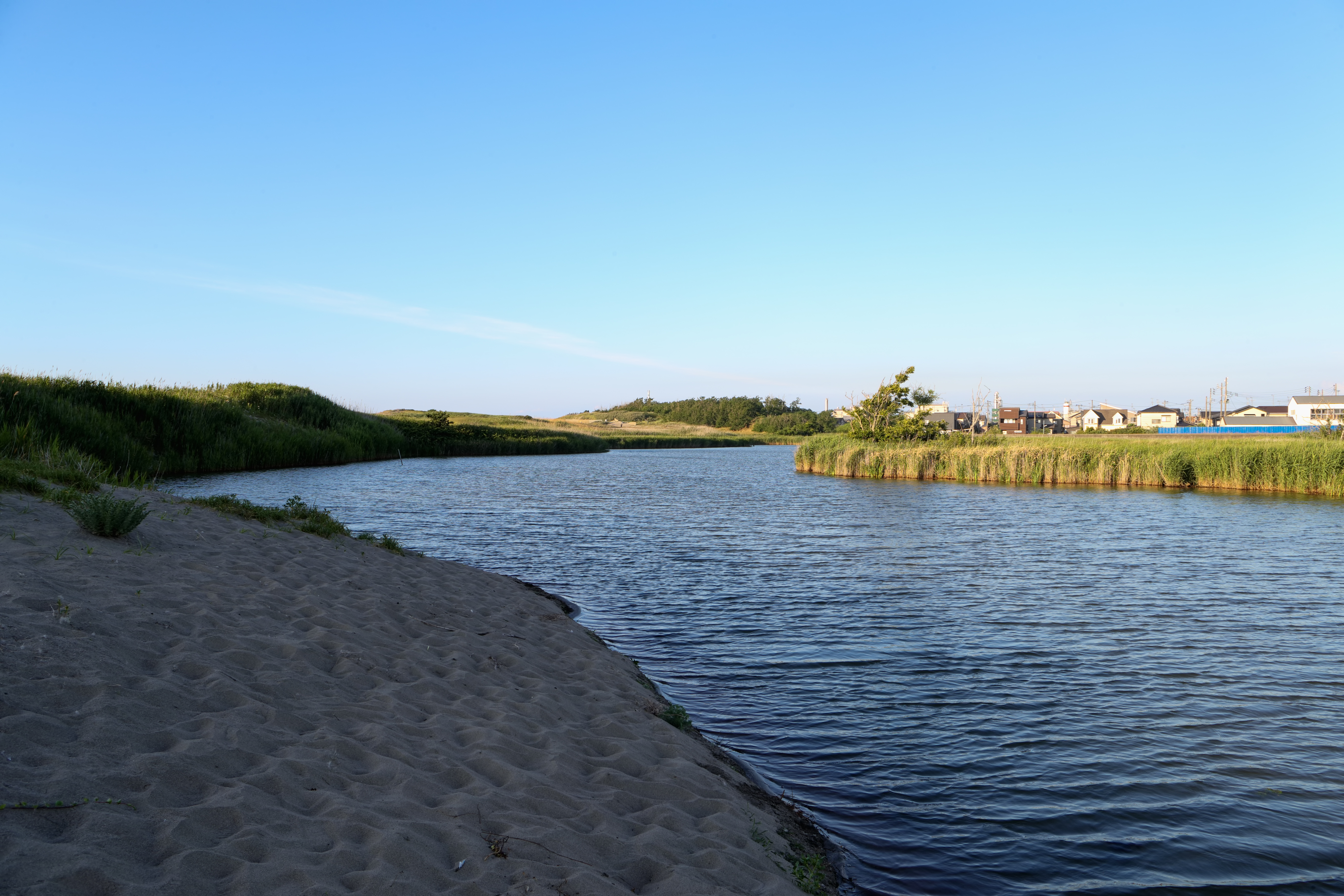 新潟県新潟市北区松浜にある松浜の池を西側から臨む